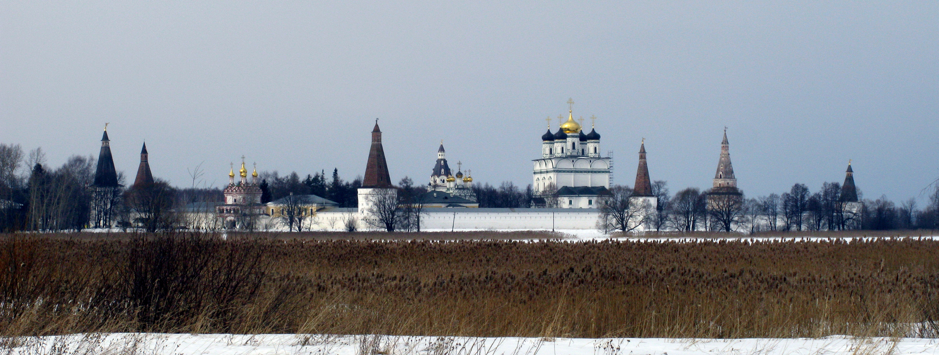 Иосифо-Волоцкий монастырь (село Теряево Волоколамского района Московской области)